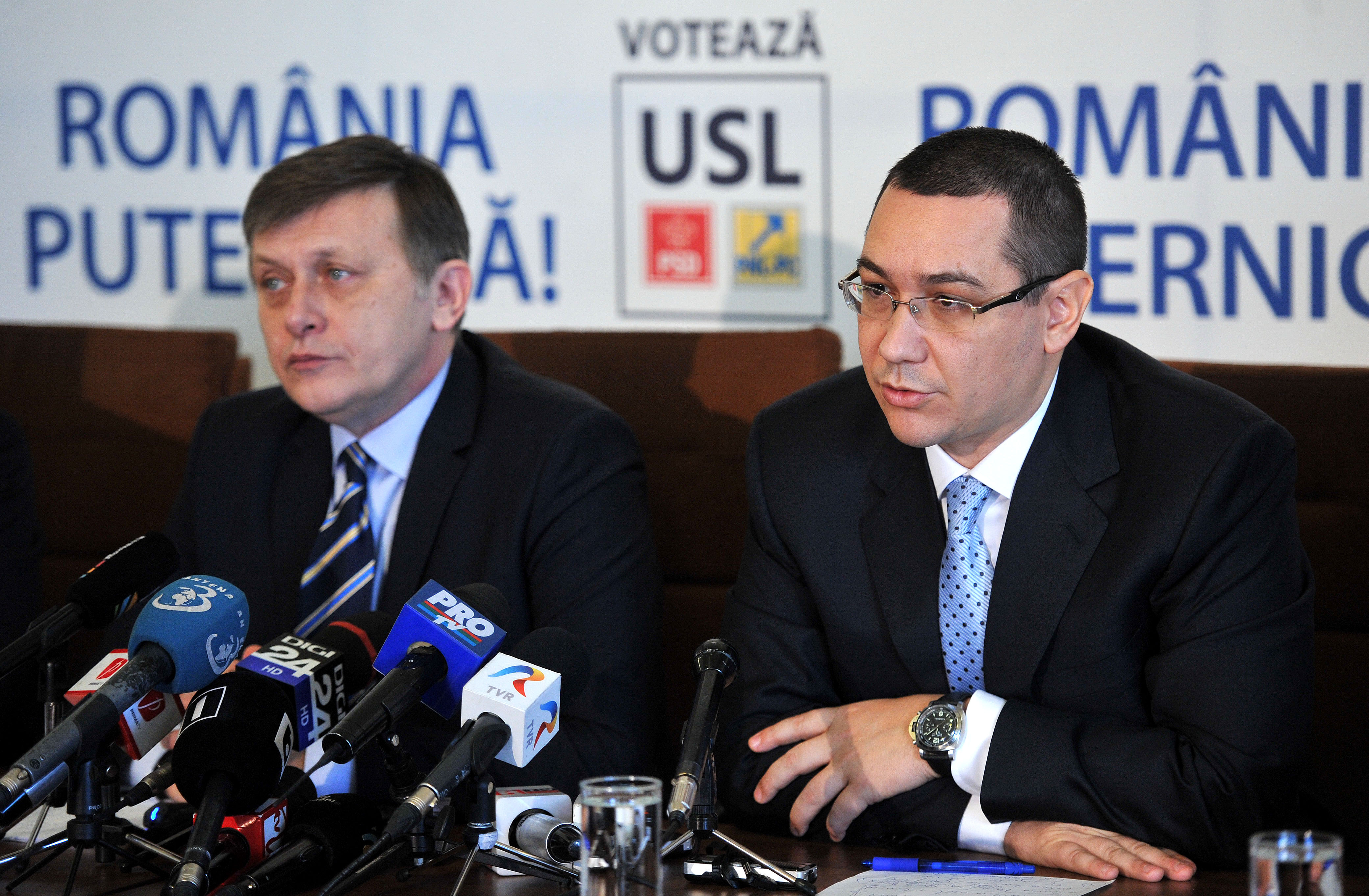 Victor Ponta la reuniunea USL - 13.01.2014 (2)